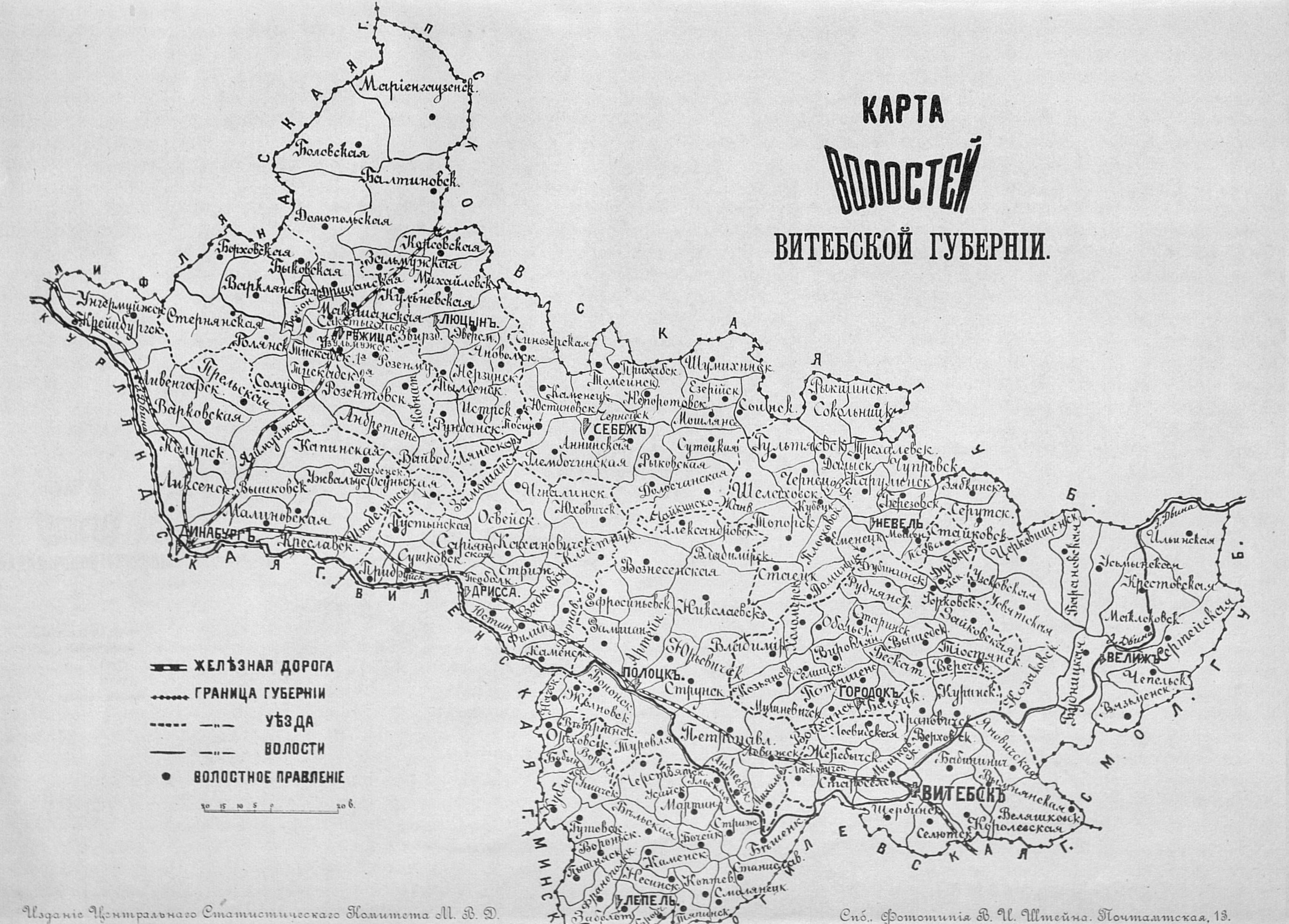 Карта волостей Витебской губернии